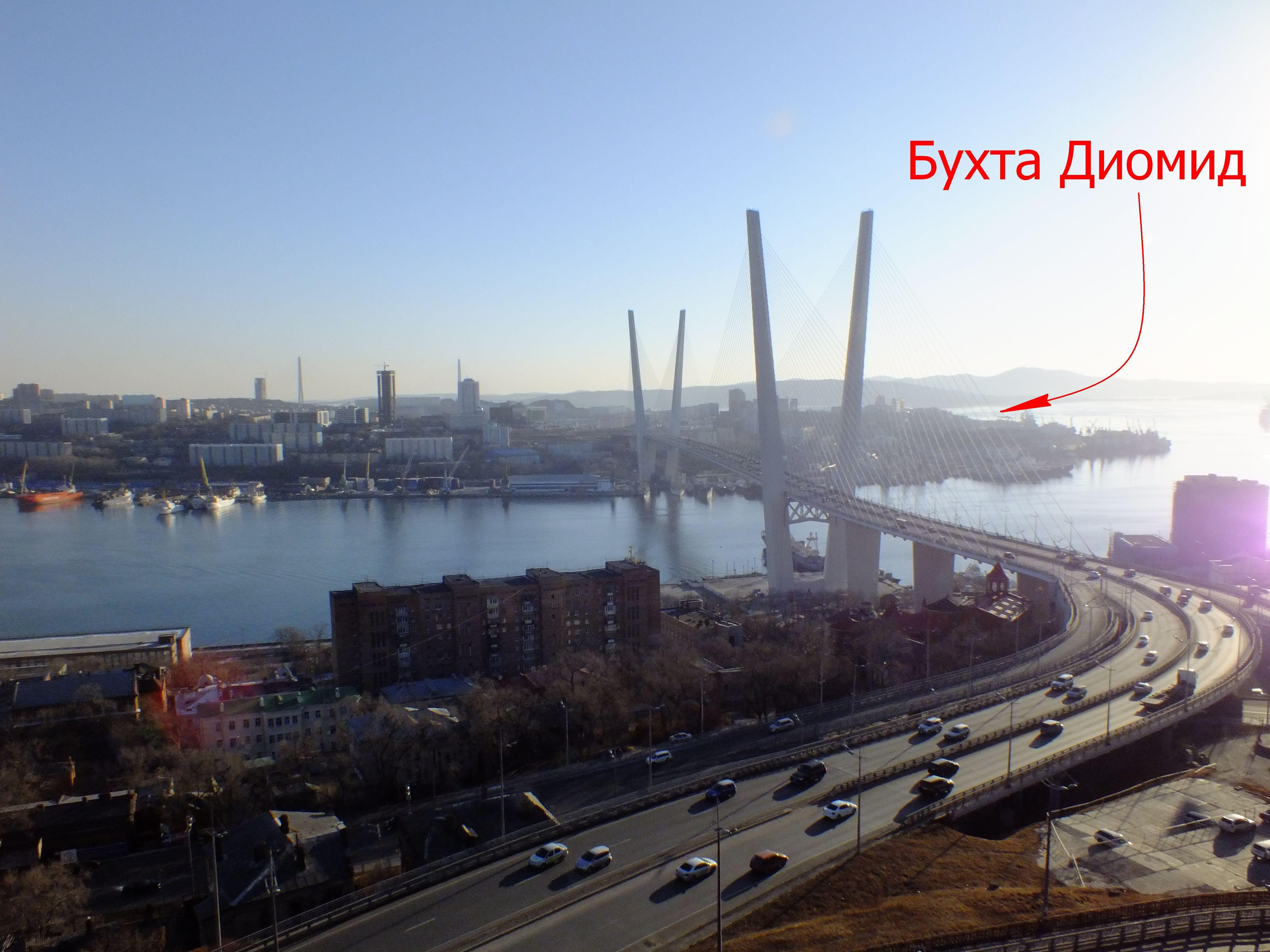 Вид на бухту Золотой Рог Владивосток от верхней станции фуникулера